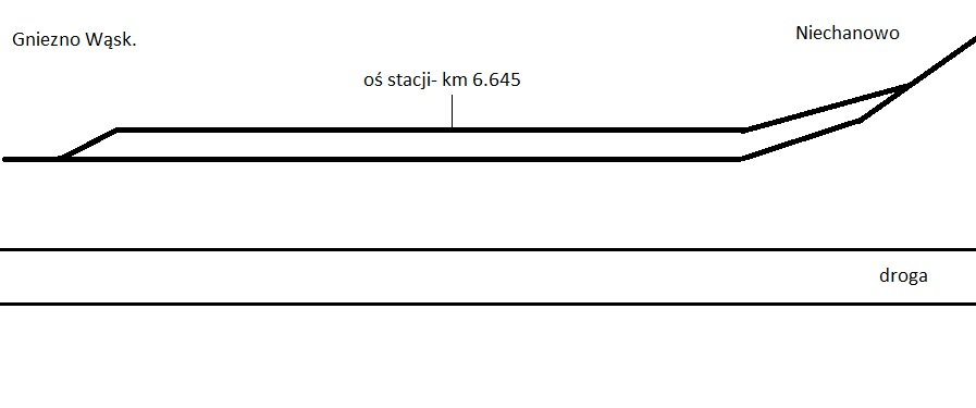 Szkic przystanku osobowego Żelazkowo, 01.01.1958 r.